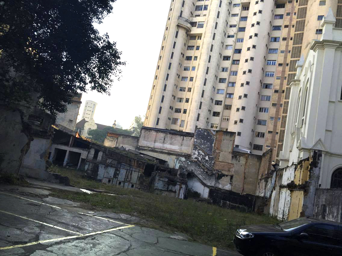 Área interna após o incêndio do Teatro Cultura Artística, em São Paulo (SP), Brasil